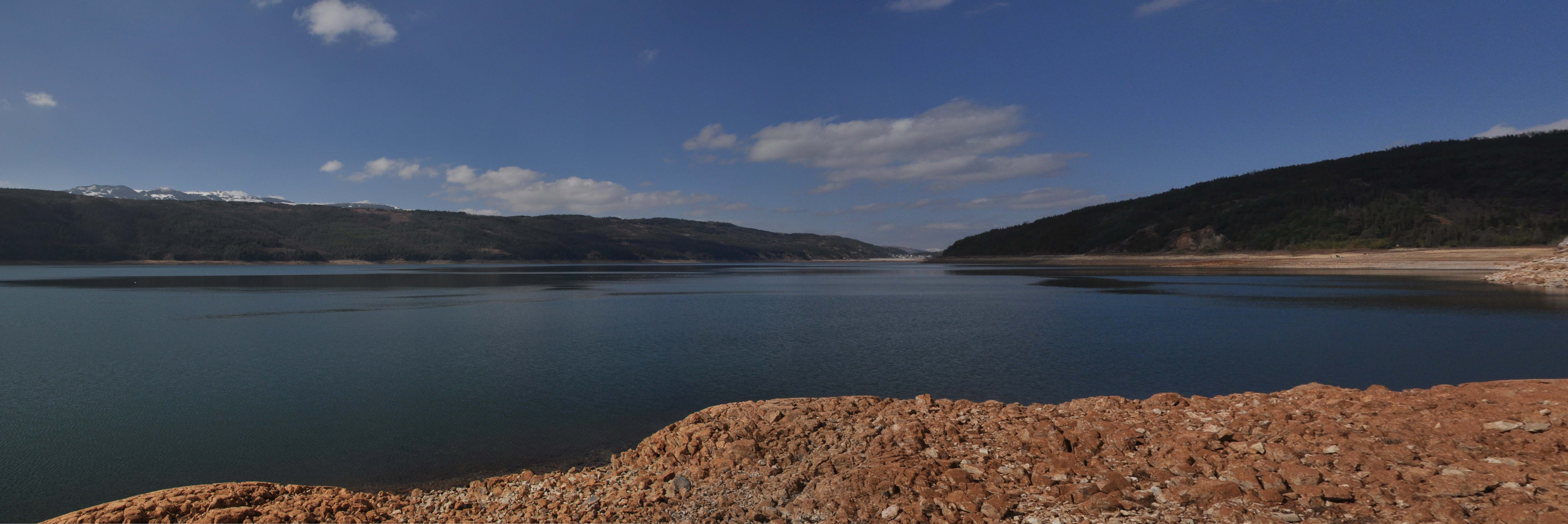 清水海北部水域。